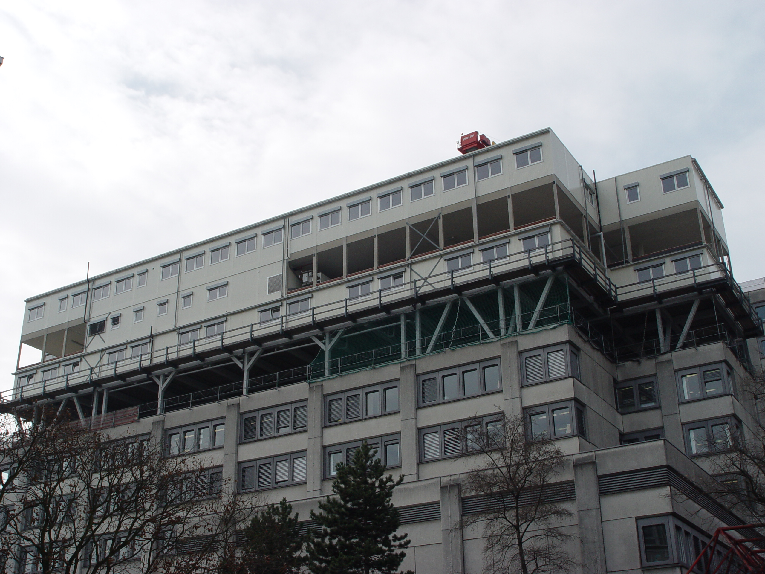 Dieses Foto zeigt die provisorische Aufstockung des Inselspitals Bern durch einen Hybrid-Modulbau